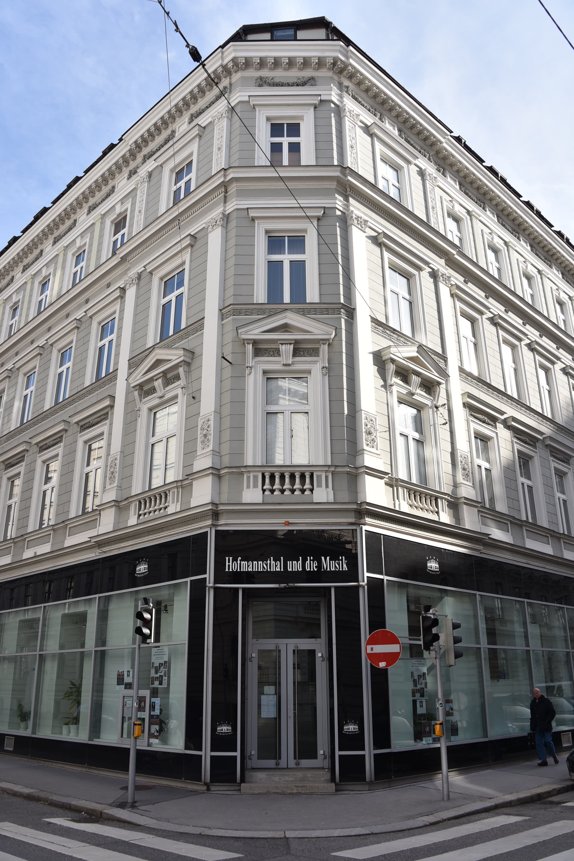 Haus Hofmannsthal in der Reisnerstraße 37 in Wien, Bezirk Landstrasse